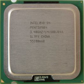 Intel Pentium 4 3.4G LGA775